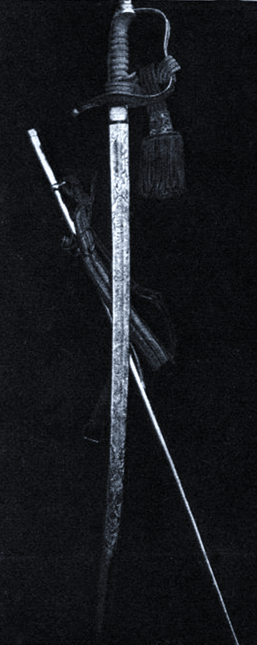 Ehrensäbel des Eduard Fischer, gewährt 1915, erstellt 1917